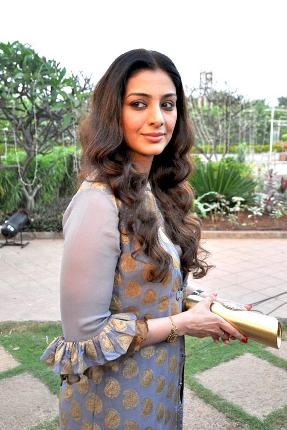 Tabu at Book launch of Kaifi & I